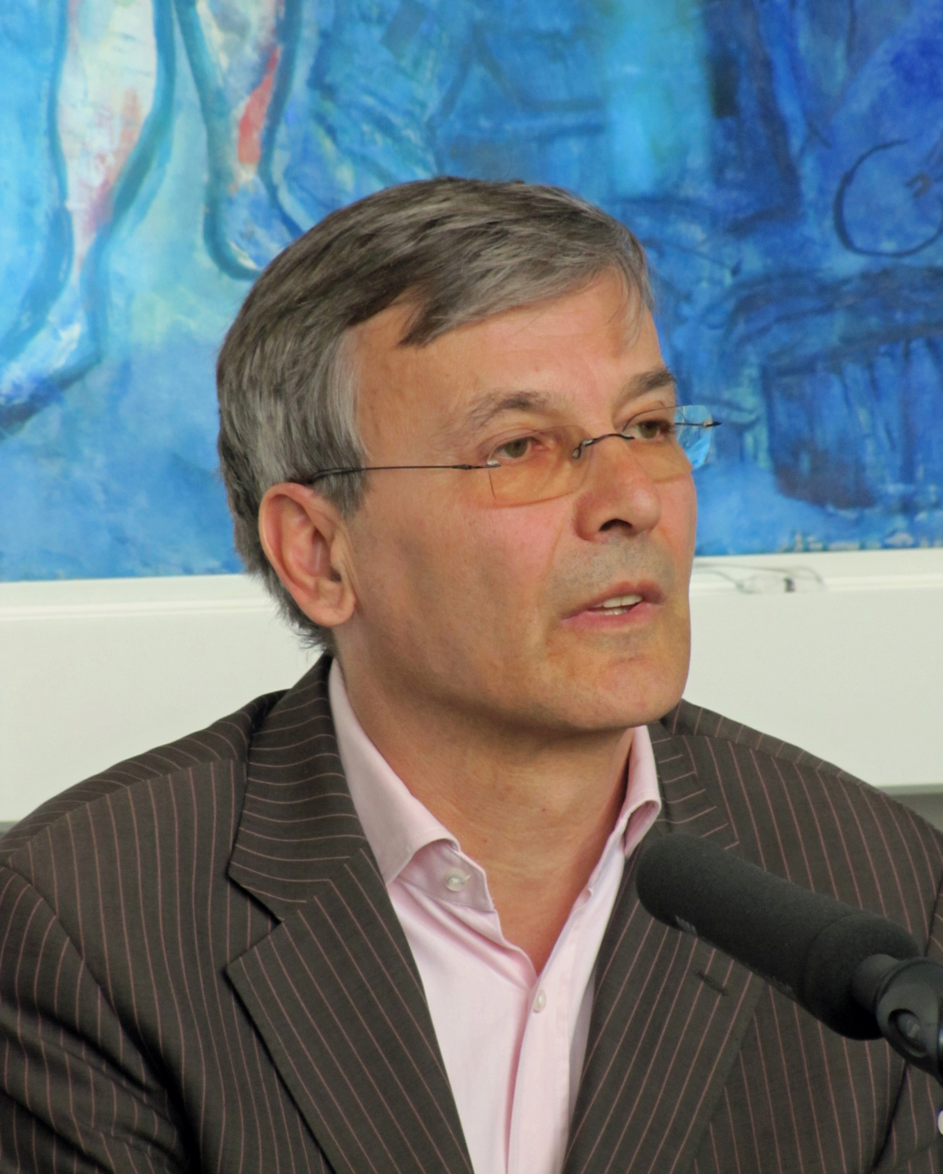 Gabor Demszky, 2012 bei den Roemerberggespraechen in Ffm.